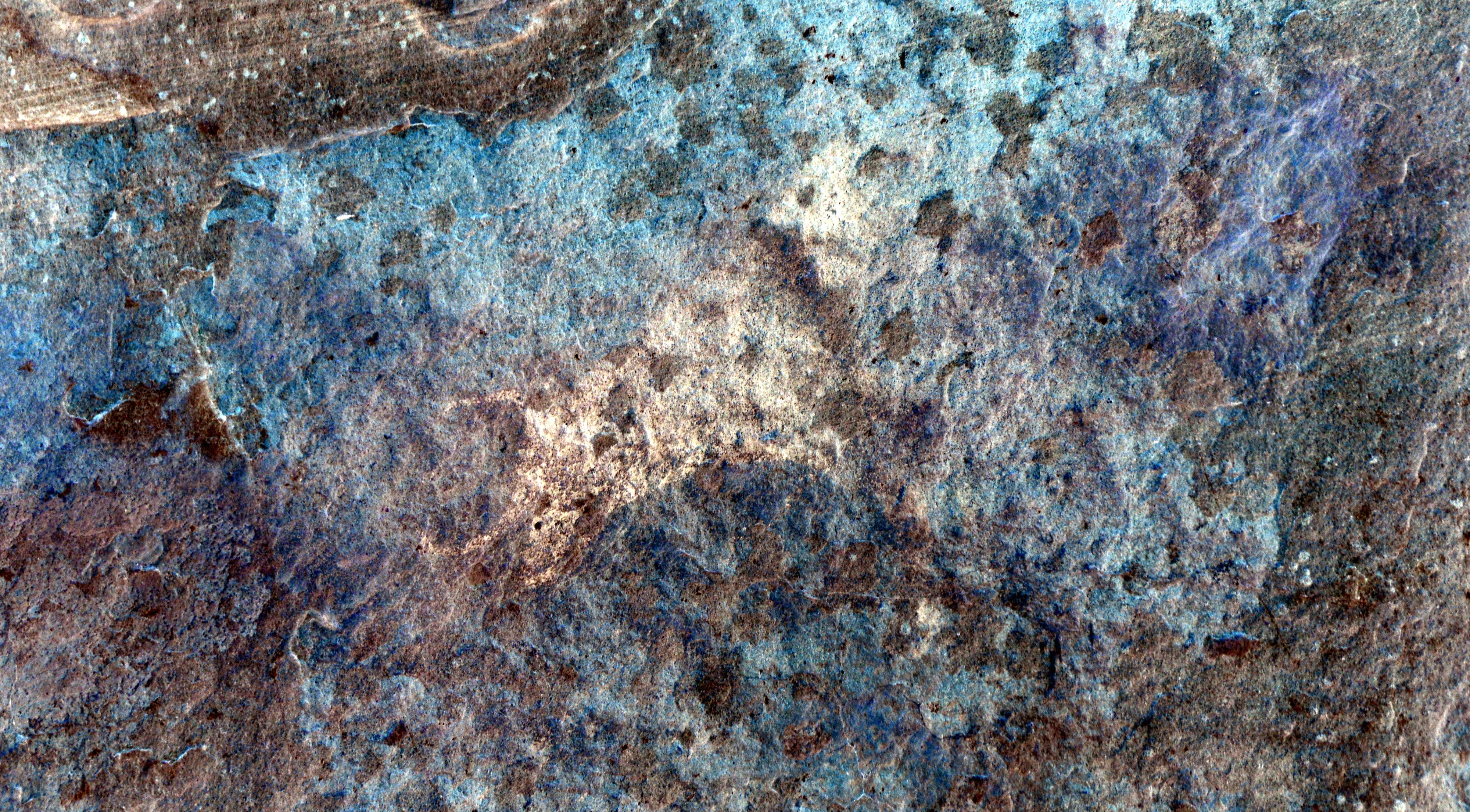 Detalle de bóvido en el Abrigo de la Cerrada del Tío Jorge en Tormón (tratamiento digital: negativo), Parque Cultural de Albarracín (2018).